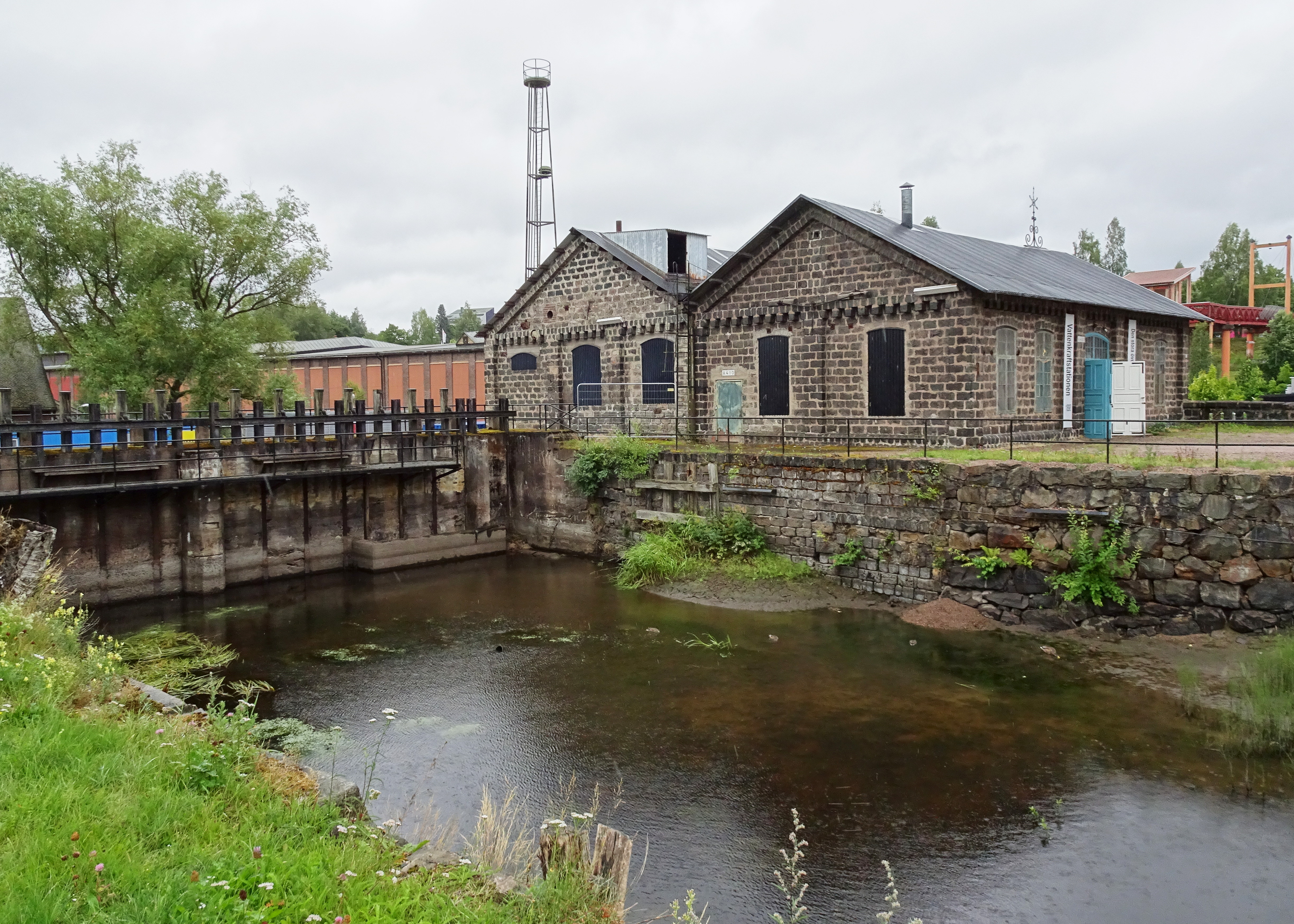 Avesta gamla kraftstation från 1898